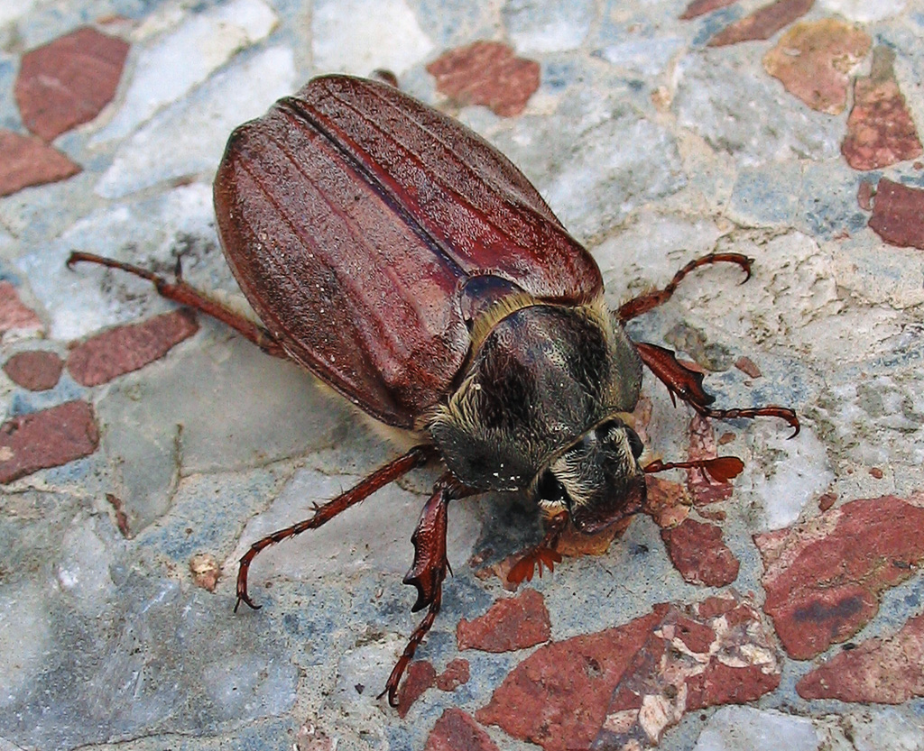 Beschreibung: Feldmaikäfer (Melolontha melolontha) / Weibchen Fotograf: Darkone, 8. Mai 2005